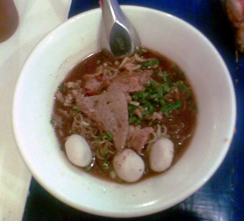 Nam tok bami noodles